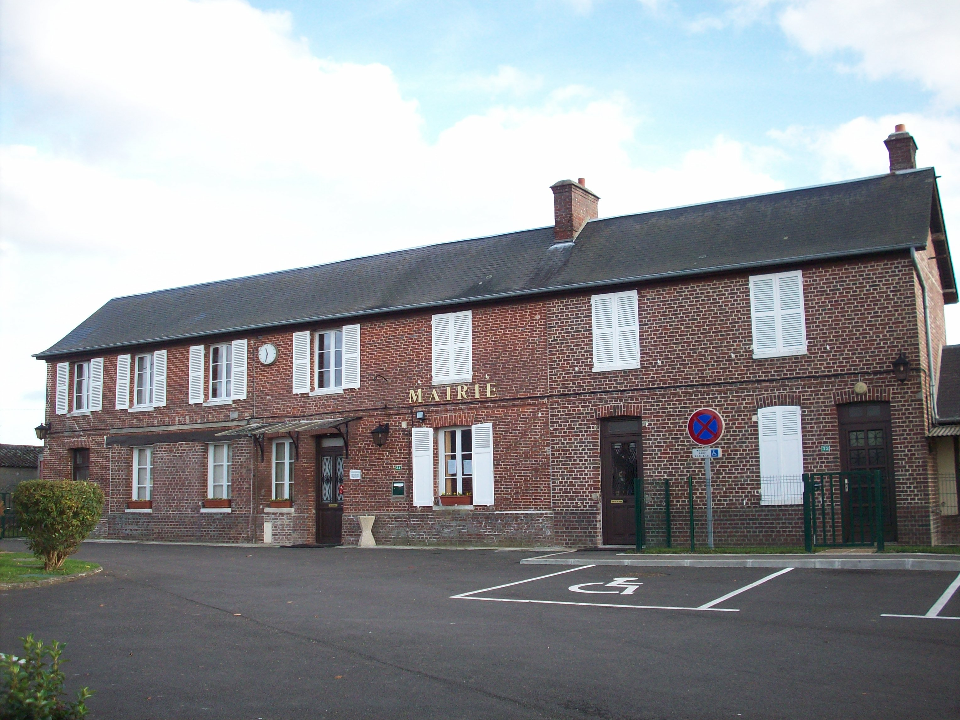 Mairie de Rosay-sur-Lieure, située sur le plateau.